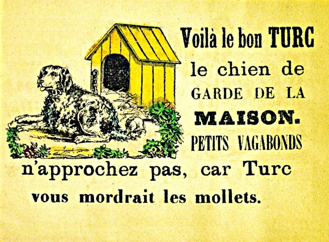 Images d'Épinal : Alphabet des enfants sages